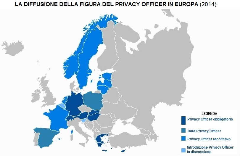 Grafico della diffusione della figura del privacy officer in Europa sulla base dei dati del CNIL del 2012, aggiornati con gli ultimi sviluppi fino al 2014